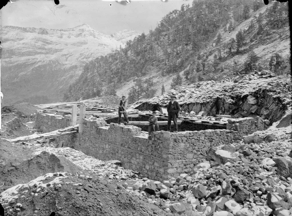 Imatge